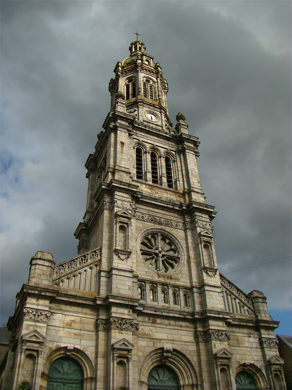 Basilique Saint-Gervais, Avranches, Manche, Normandie, France.